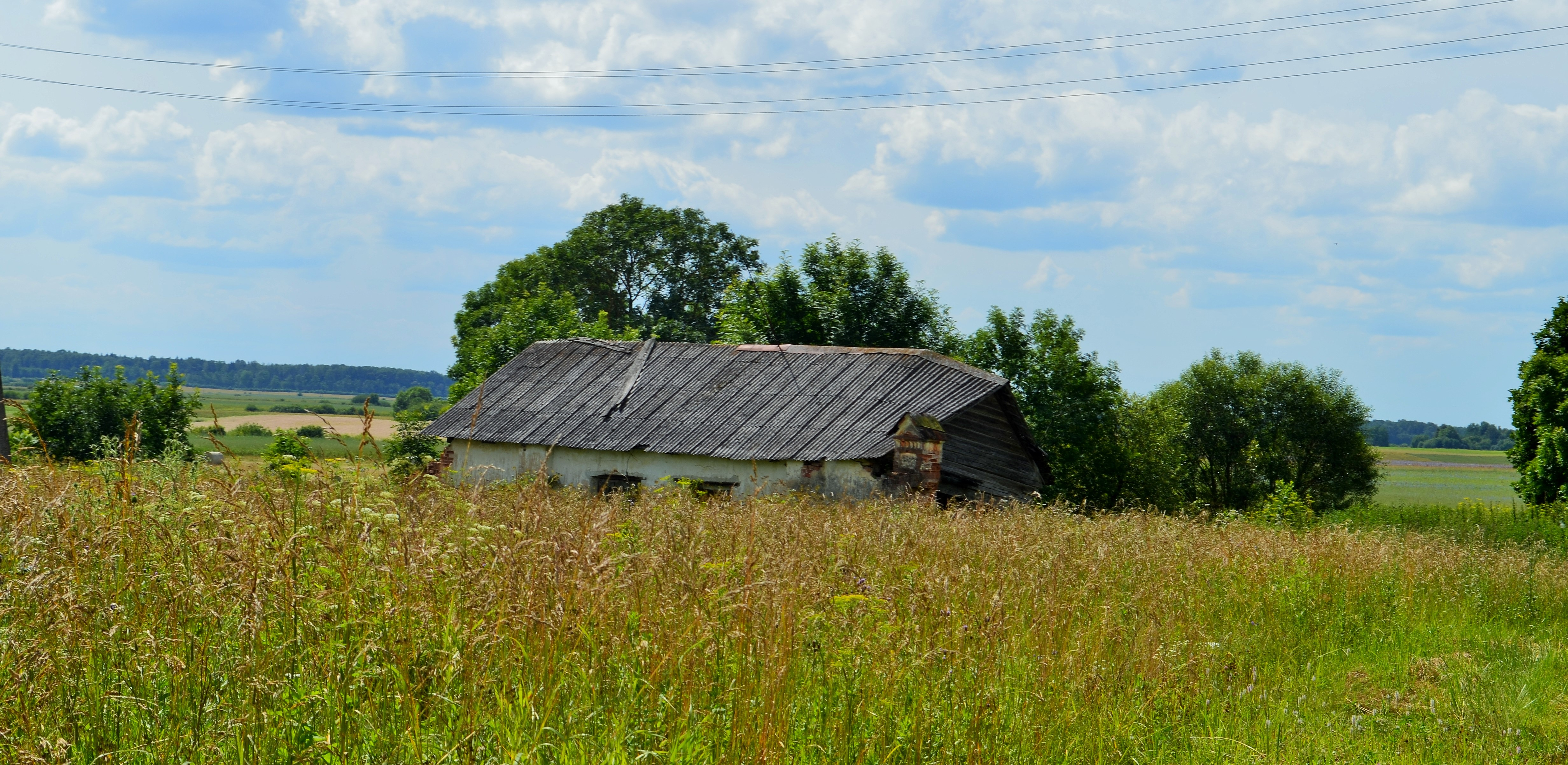 Lokinės dvaro arklidė, Ukmergės raj.